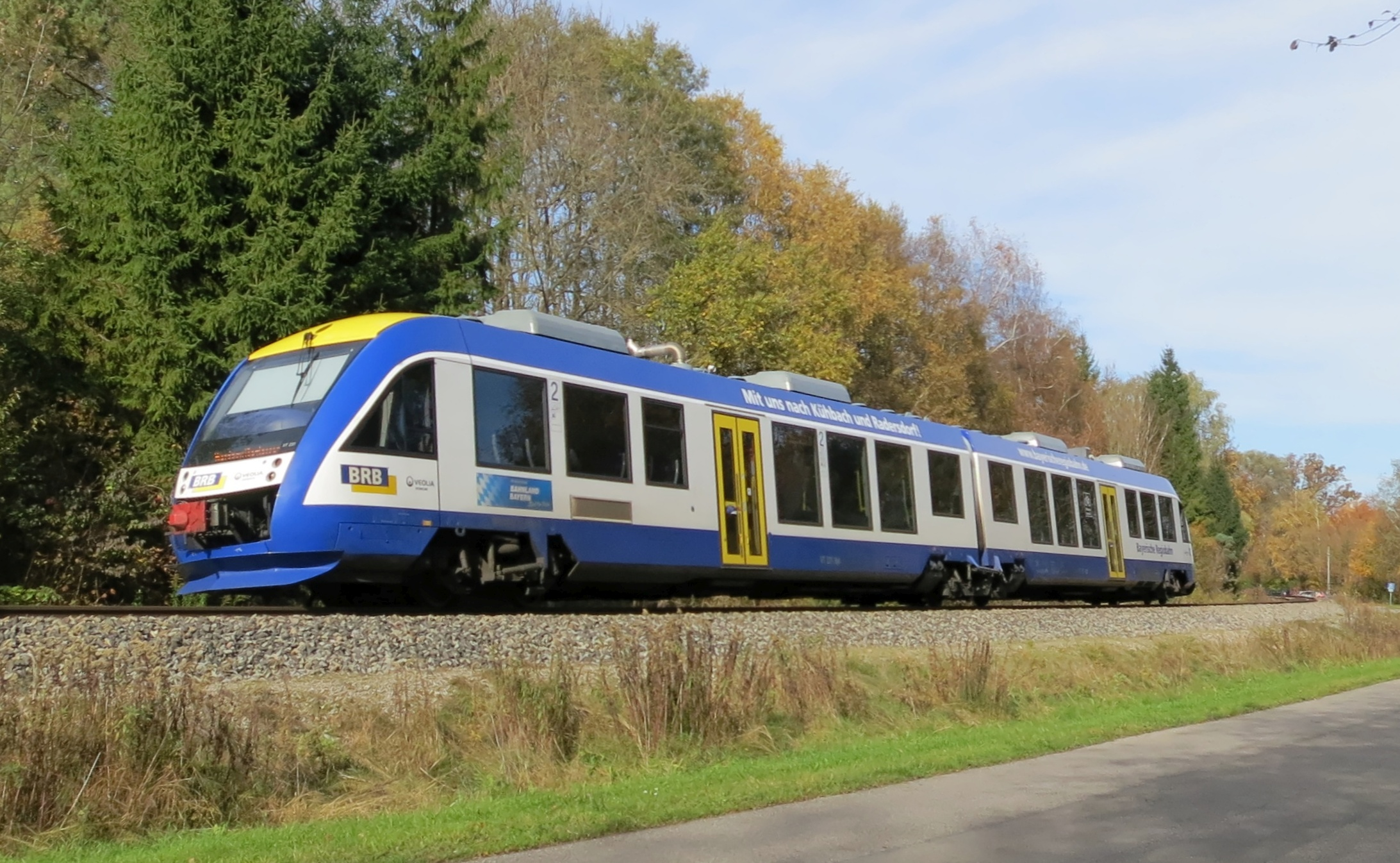 LINT-41-Triebwagen auf der Ammerseebahn südlich von Dießen